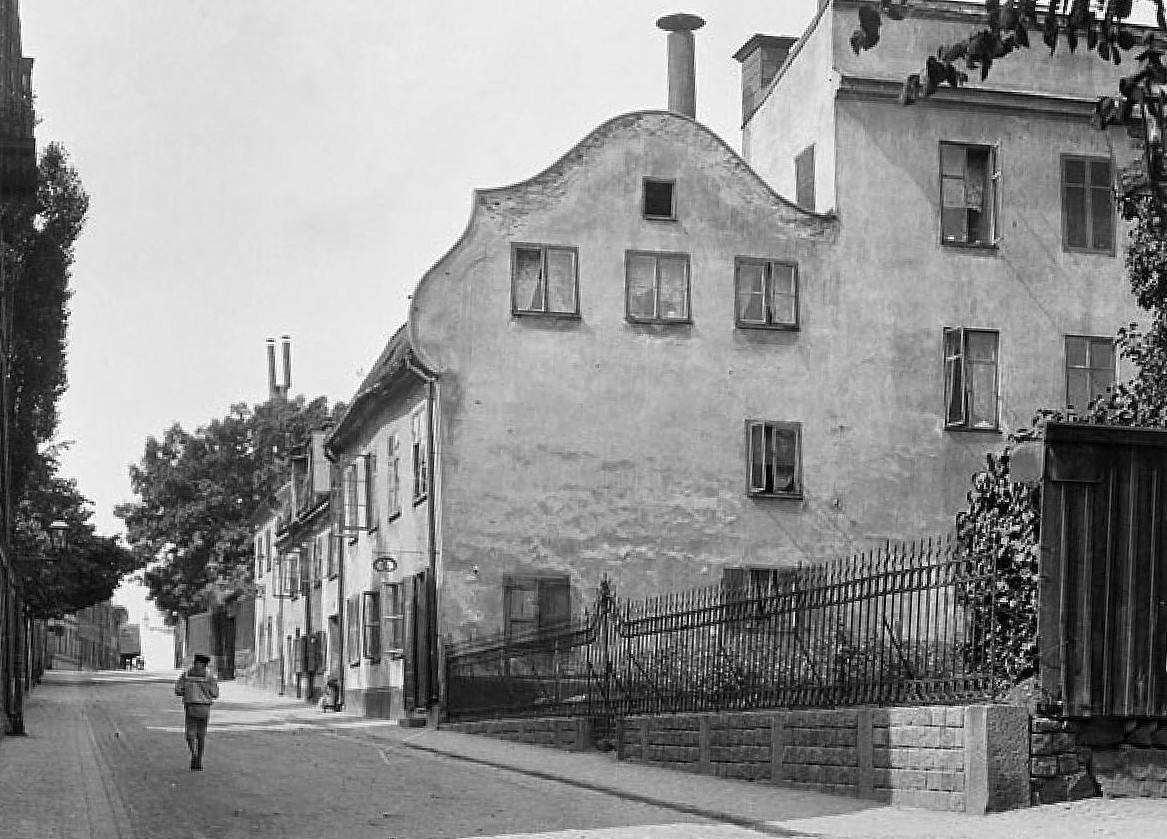 Bastugatan 22, 24 och 26, nuv. kvarteret Kattörat